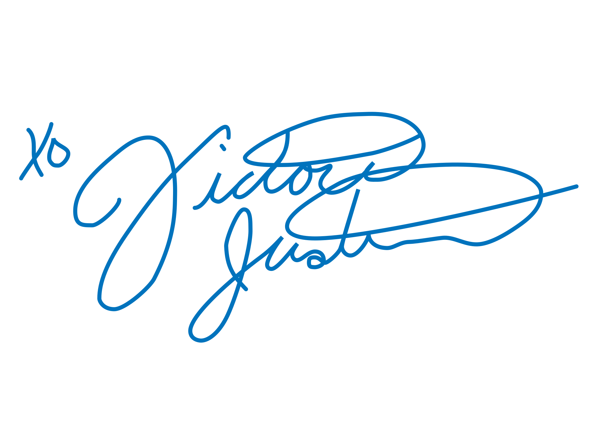 El autógrafo de Victoria Justice.